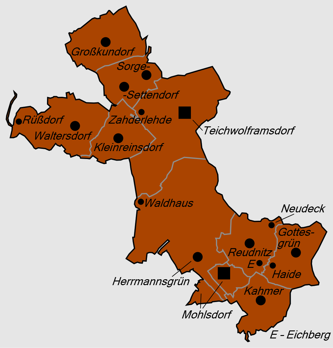 Gliederung der Gemeinde Mohlsdorf-Teichwolframsdorf ab 1. Januar 2012